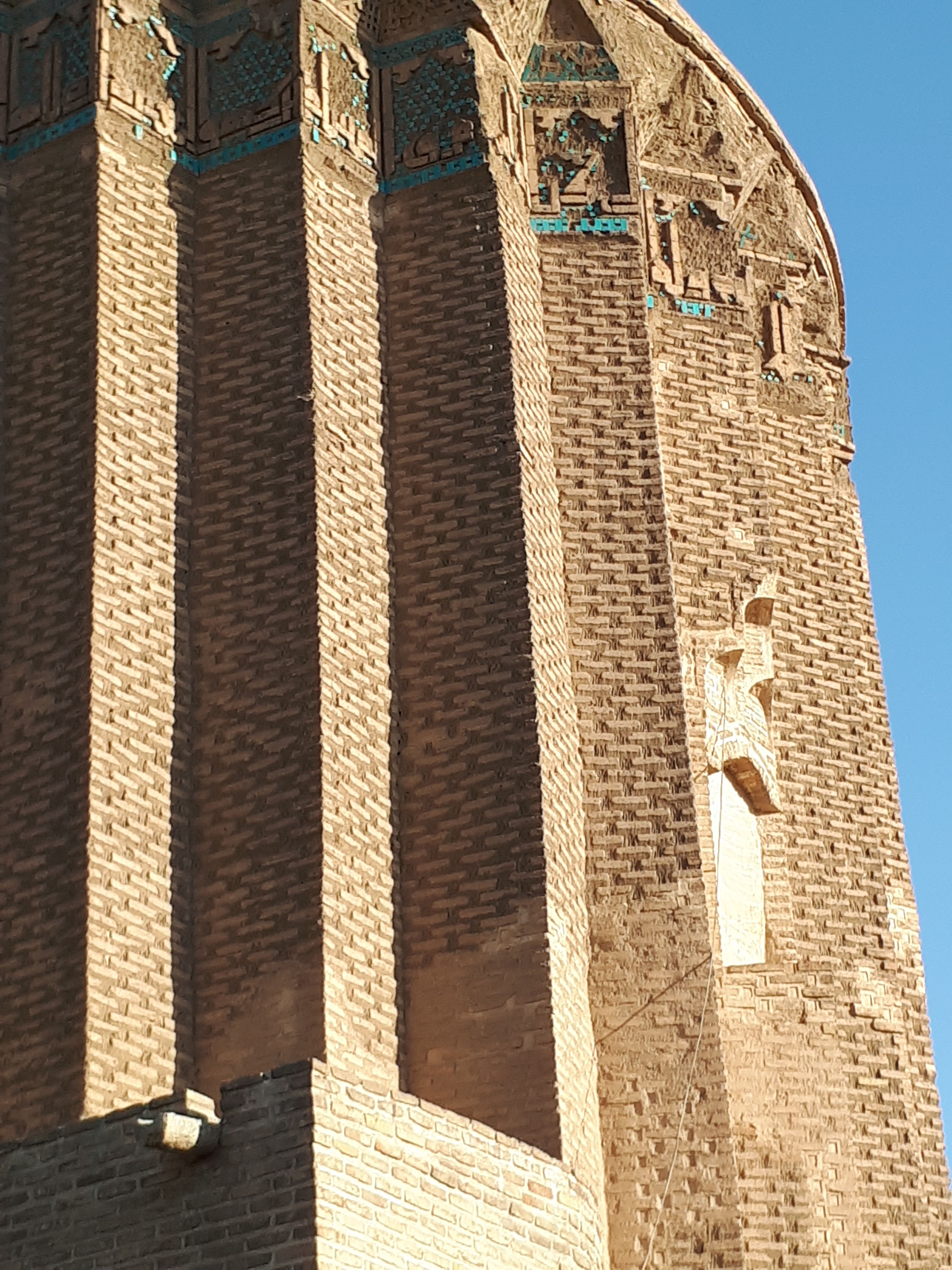 معماری دوره ایلخانیان